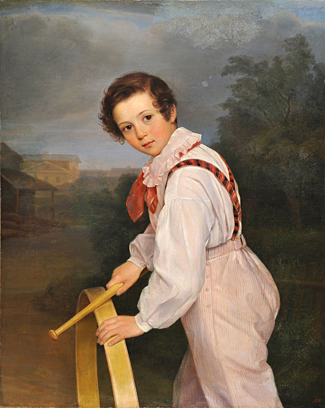 Бибиков Сергей Дмитриевич (1828 - не ранее 1855), сын Дмитрия Гавриловича и Софьи Сергеевны Бибиковых.